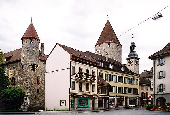 Bulle, im Hintergrund das Schloss